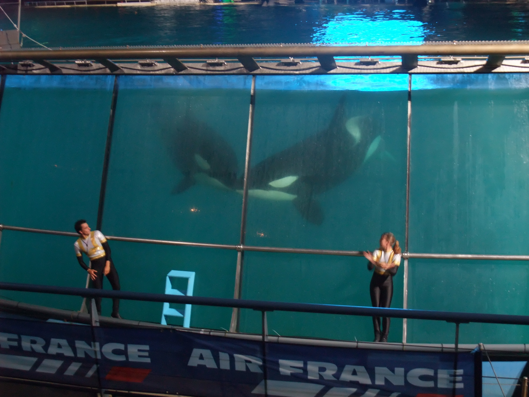 Marineland d'Antibes (France). Le spectacle des orques.